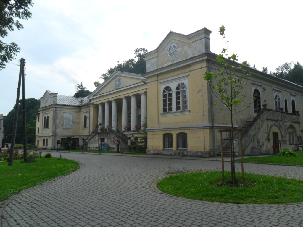 zespół pałacowy pałac park Mianocice, Książ Wielki